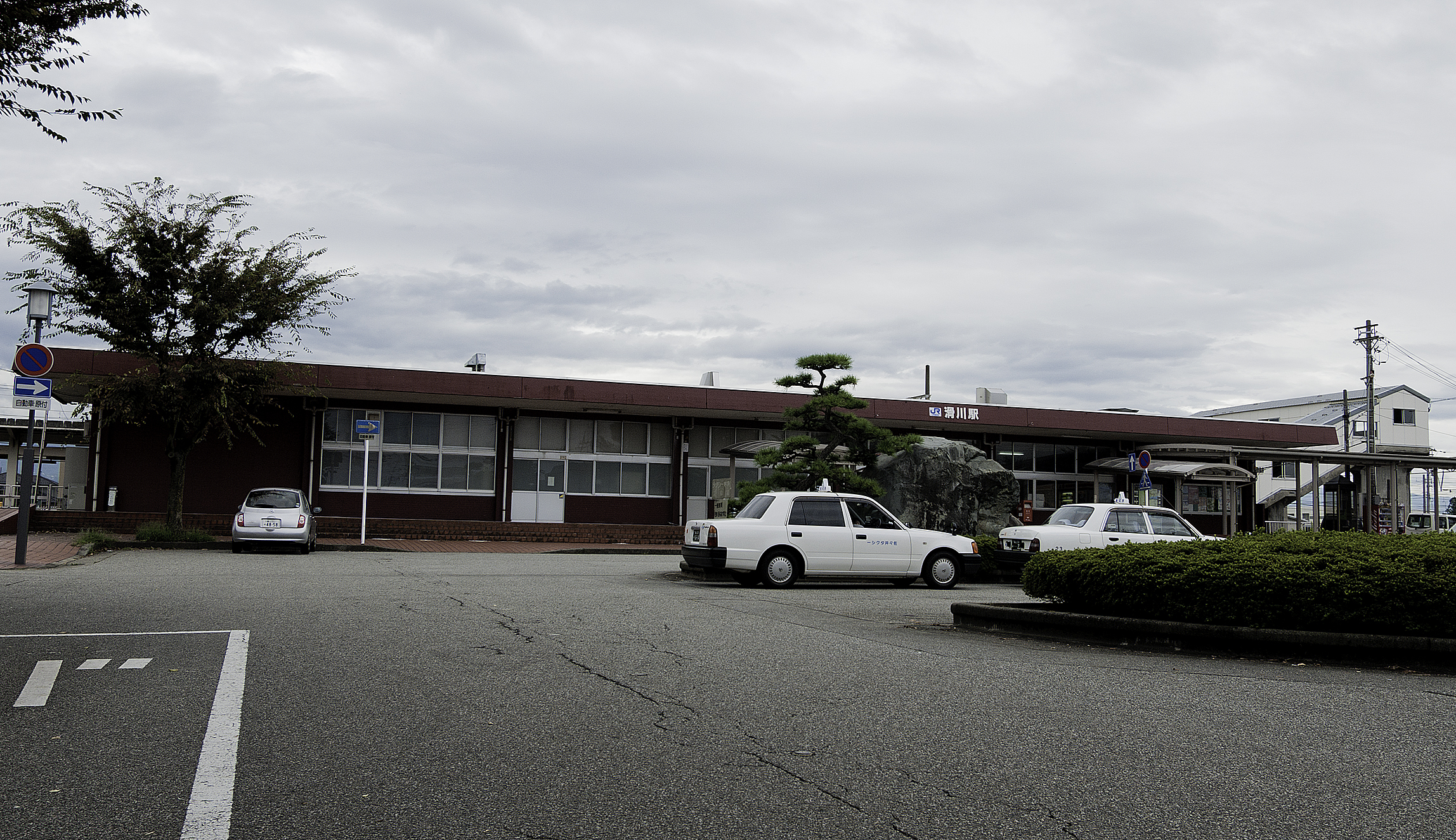 西日本旅客鉄道株式会社北陸本線滑川駅駅舎